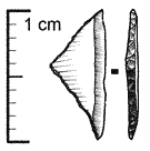 Microlito: triángulo